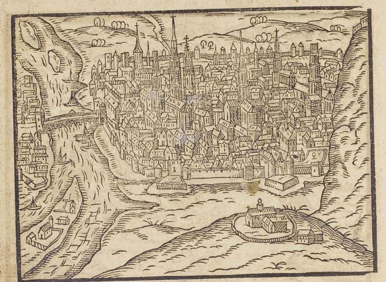 from: Abraham Saur: Theatrum Urbium. Warhafftige Contrafeytung/ und Summarische Beschreibung/ fast aller vornemen und namhafftigen Stätten/ Schlössern und Klöster ..., Frankfurt : Richter, 1610 (Erstausgabe: 1593)